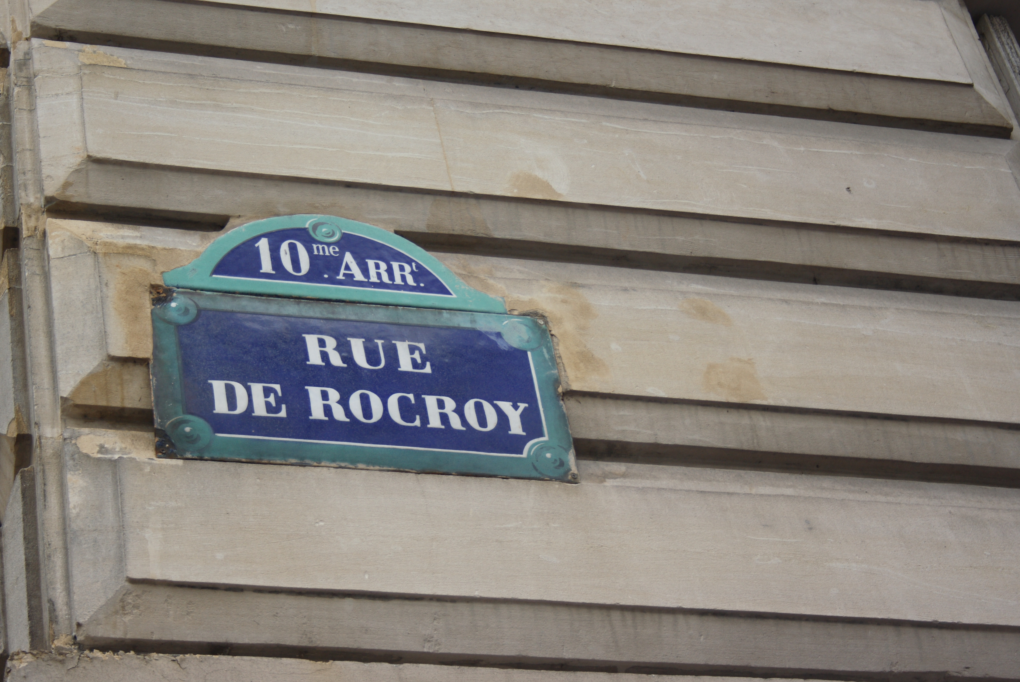 Straßenschild RUE DE ROCROY im 10. Arrondissement von Paris